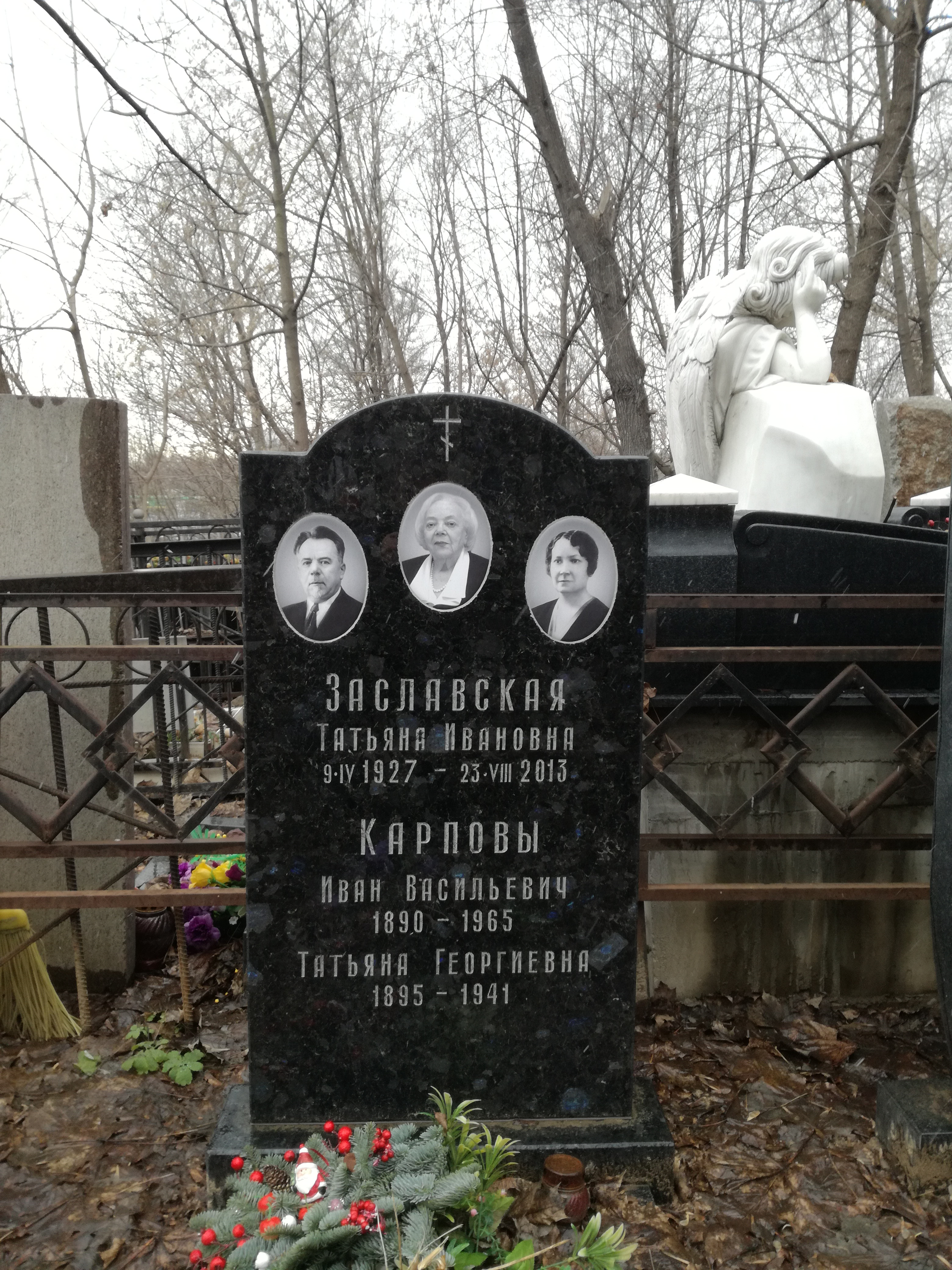 Даниловское кладбище